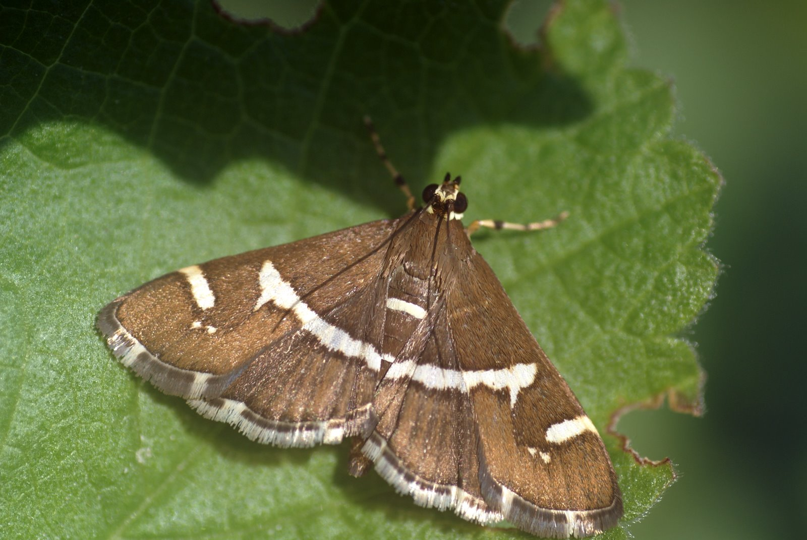 Spoladea recurvalis (Beet webworm)